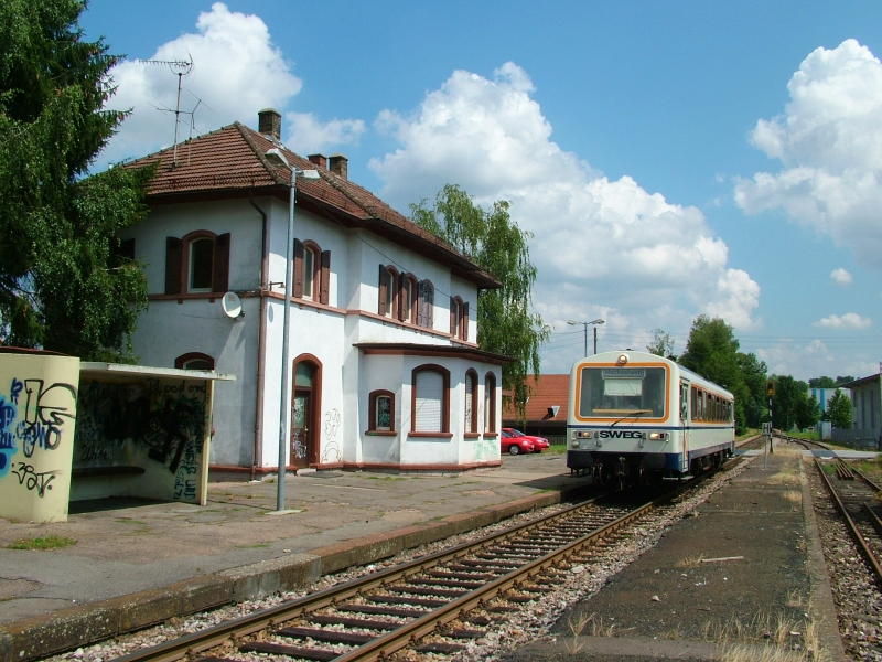 SWEG VT 120 im Bahnhof Helmstadt.